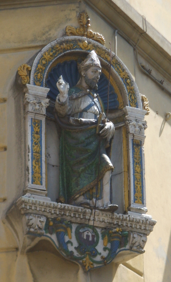 Tabernacolo di sant'ambrogio